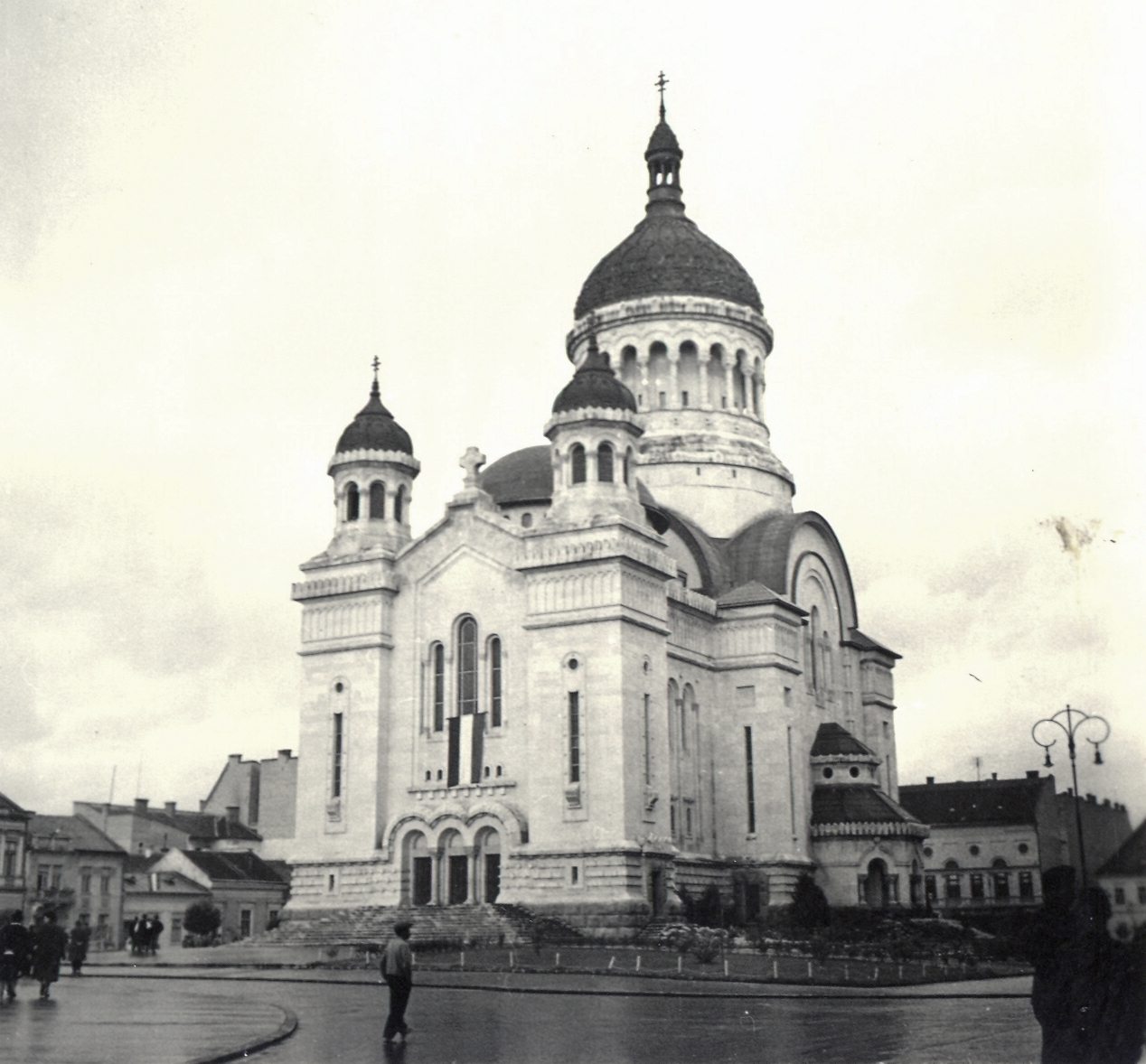 Bocskai tér, Ortodox katedrális. Location: Romania, Transylvania, Cluj-Napoca Tags: church, Eastern Orthodox Church Title: Bocskai tér, Ortodox katedrális.